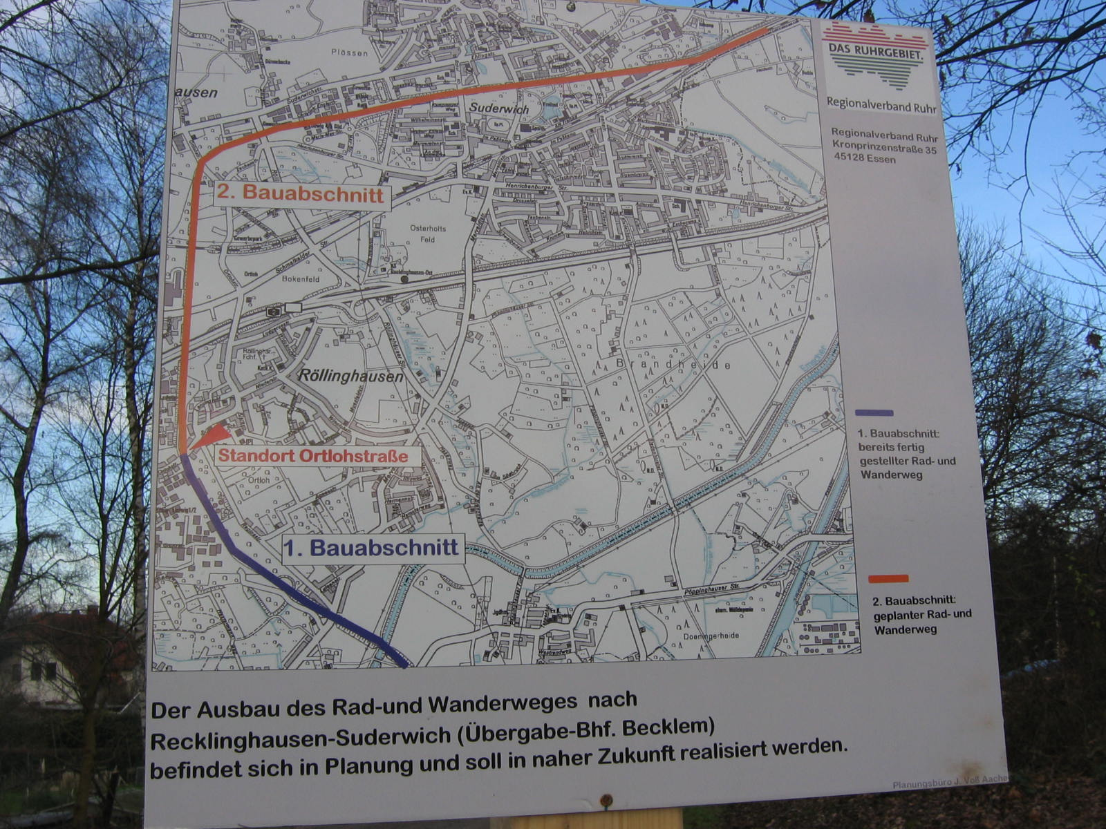 Hinweisschild zum Ausbau des König-Ludiwg-Radweges